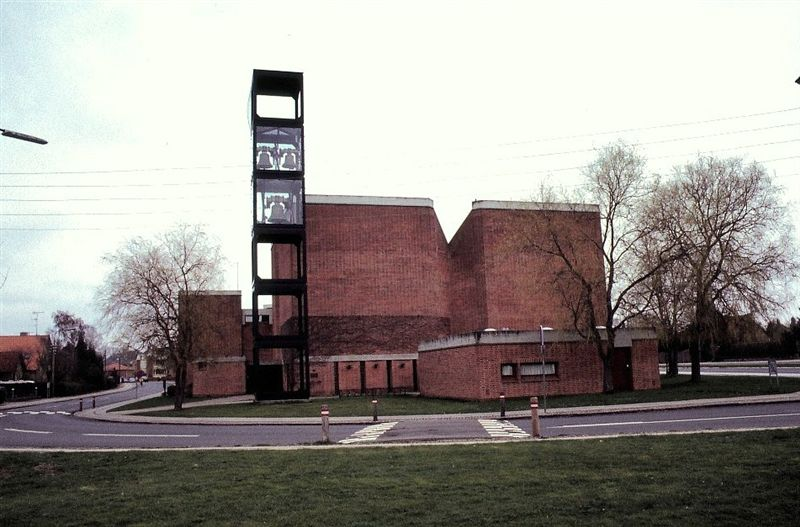 Vangede Kirke i Danmark. Vangede kirke